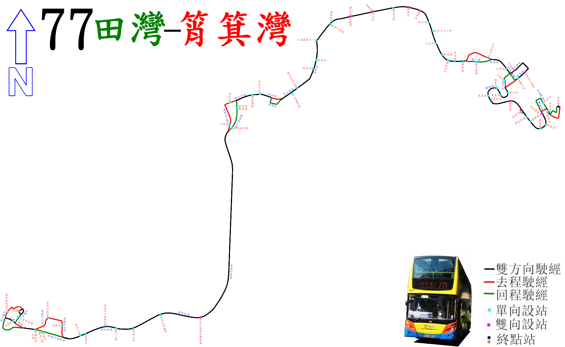 中文（香港）: 城巴77線的走線圖